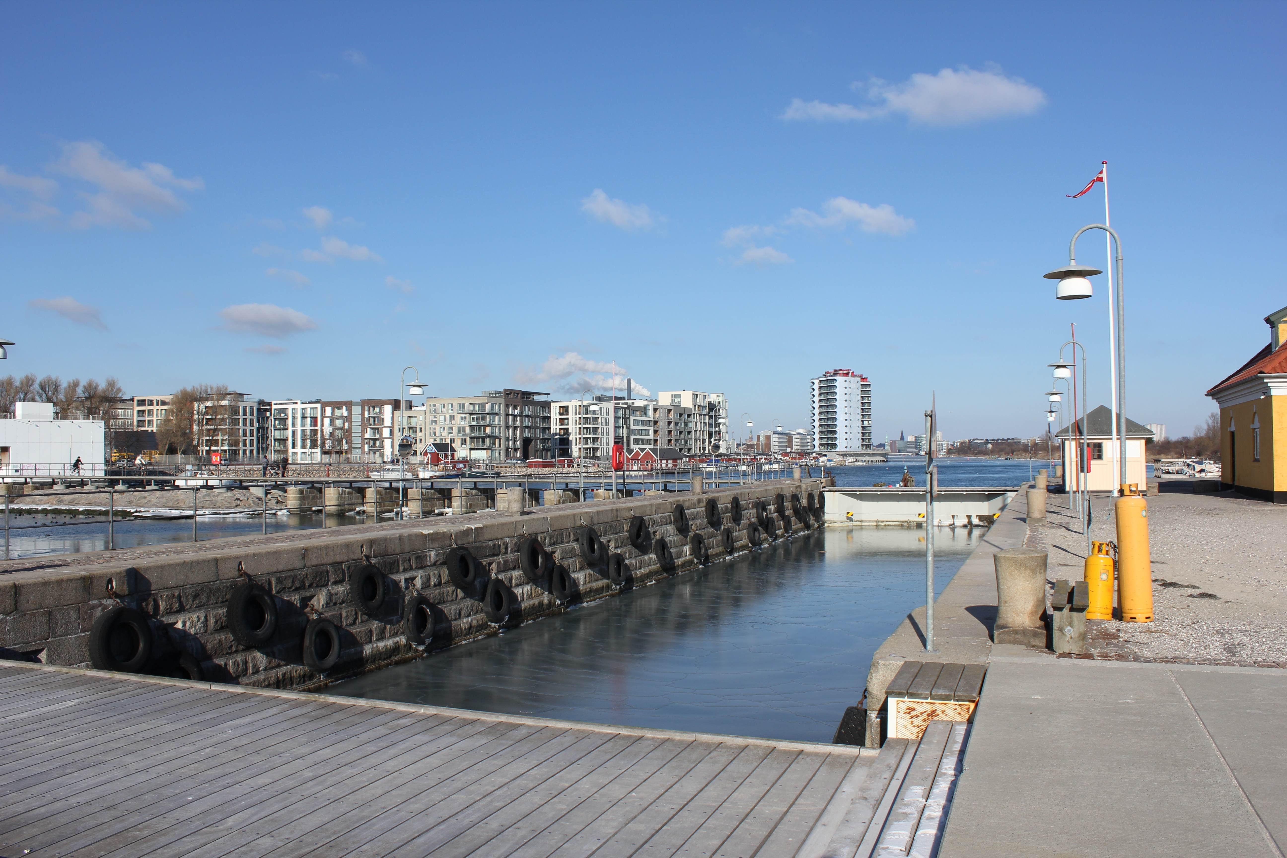 Sluseholmen set fra slusen